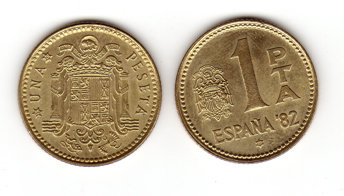 1 peseta, rubias de Joan Carles I